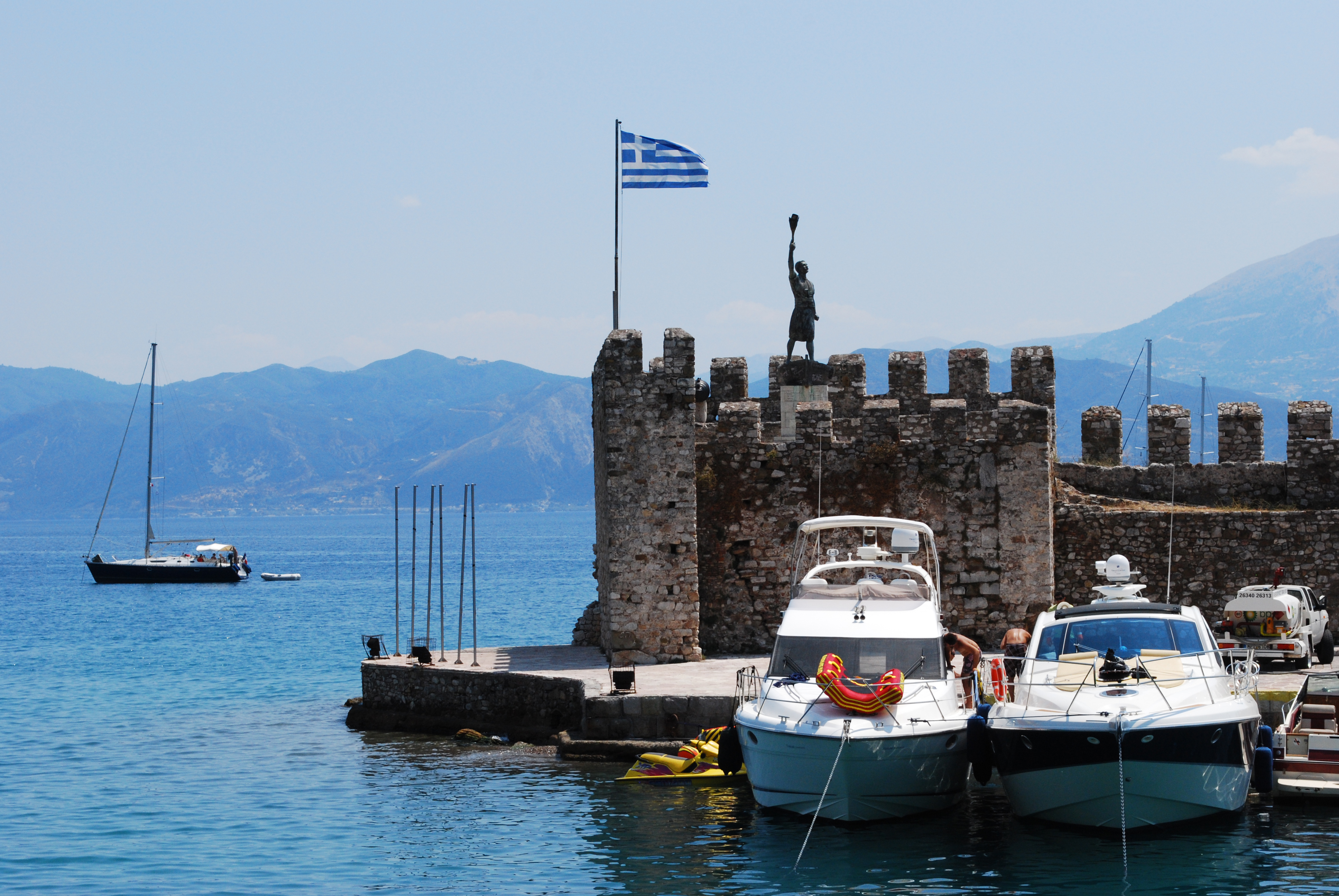 Vue du port de Nafpaktos.